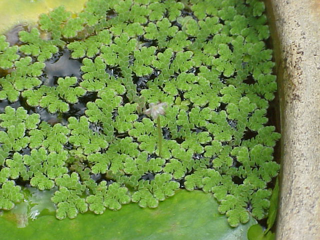 Species: Azolla caroliniana Family: Azollaceae Image No. 1